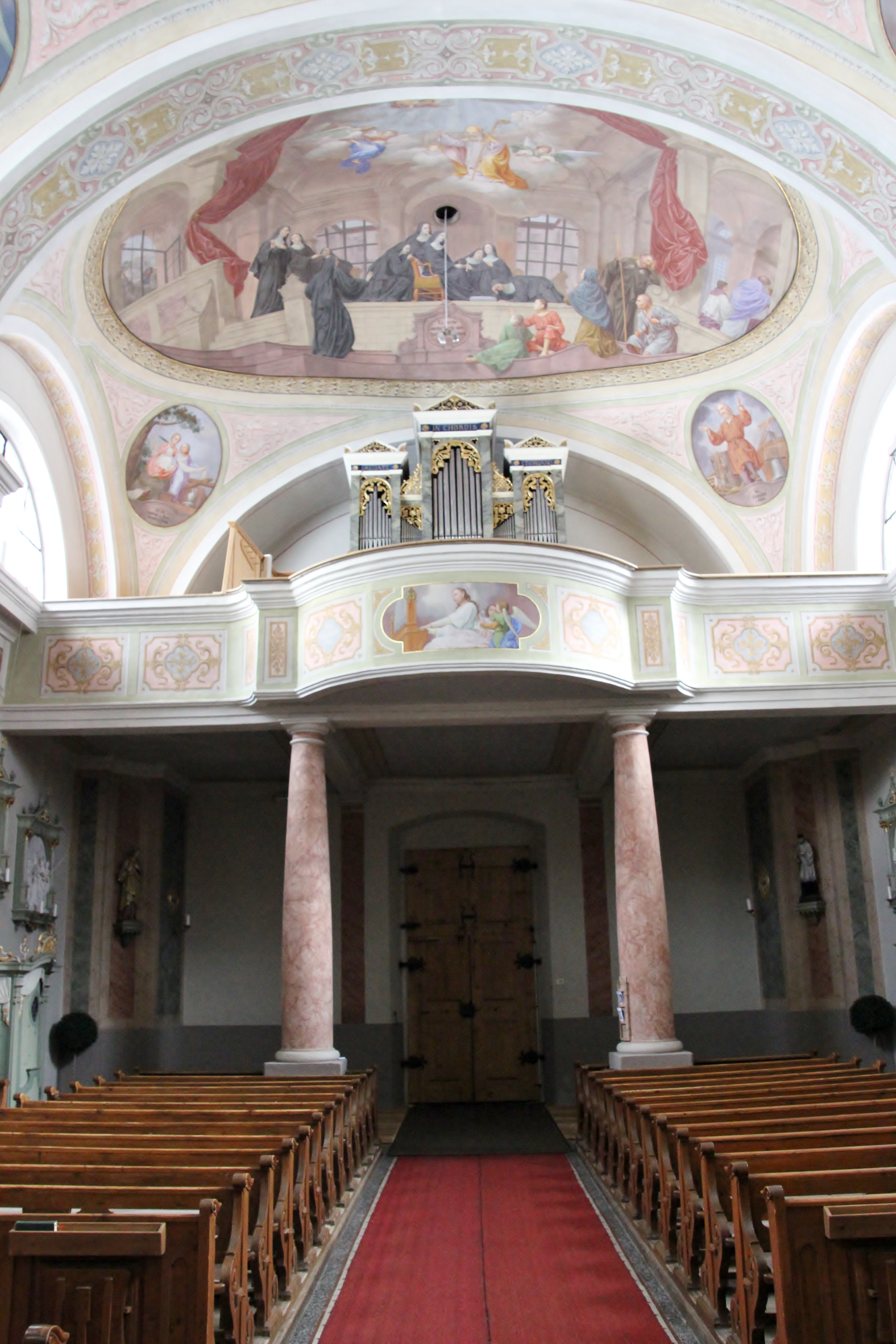 Pfarrkirche St. Gertraud in Mühlwald (Südtirol)